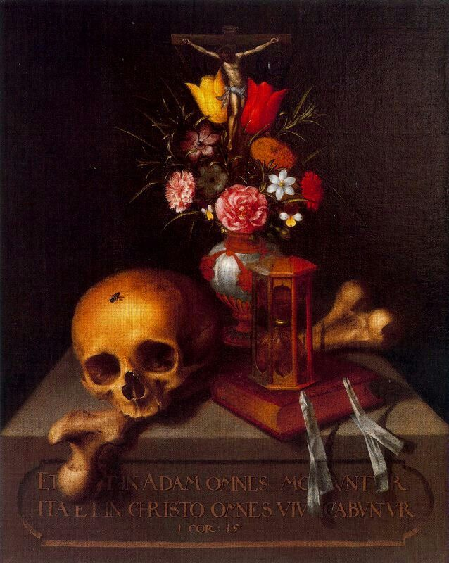 Vanitas, de Tomás Yepes, colección Naseiro, Madrid.